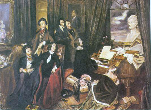 Ο Βίκτωρ Ουγκώ (όρθιος αριστερά) και άλλοι εκπρόσωποι του κινήματος του Ρομαντισμού σε φανταστική απεικόνιση